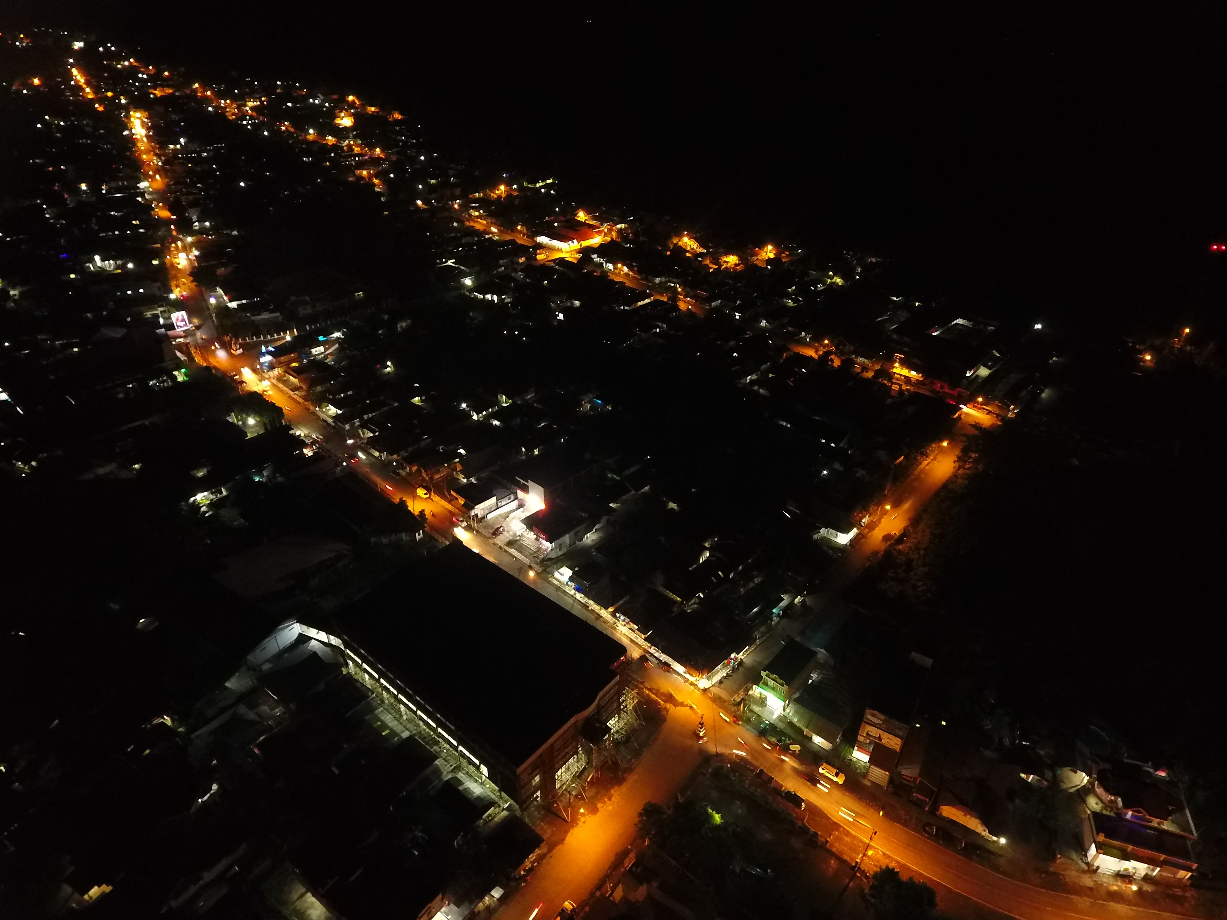 Foto udara di ambil mengunakan drone